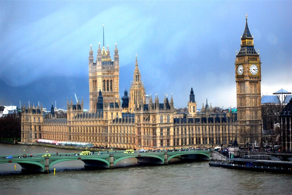 Big Ben from London Eye